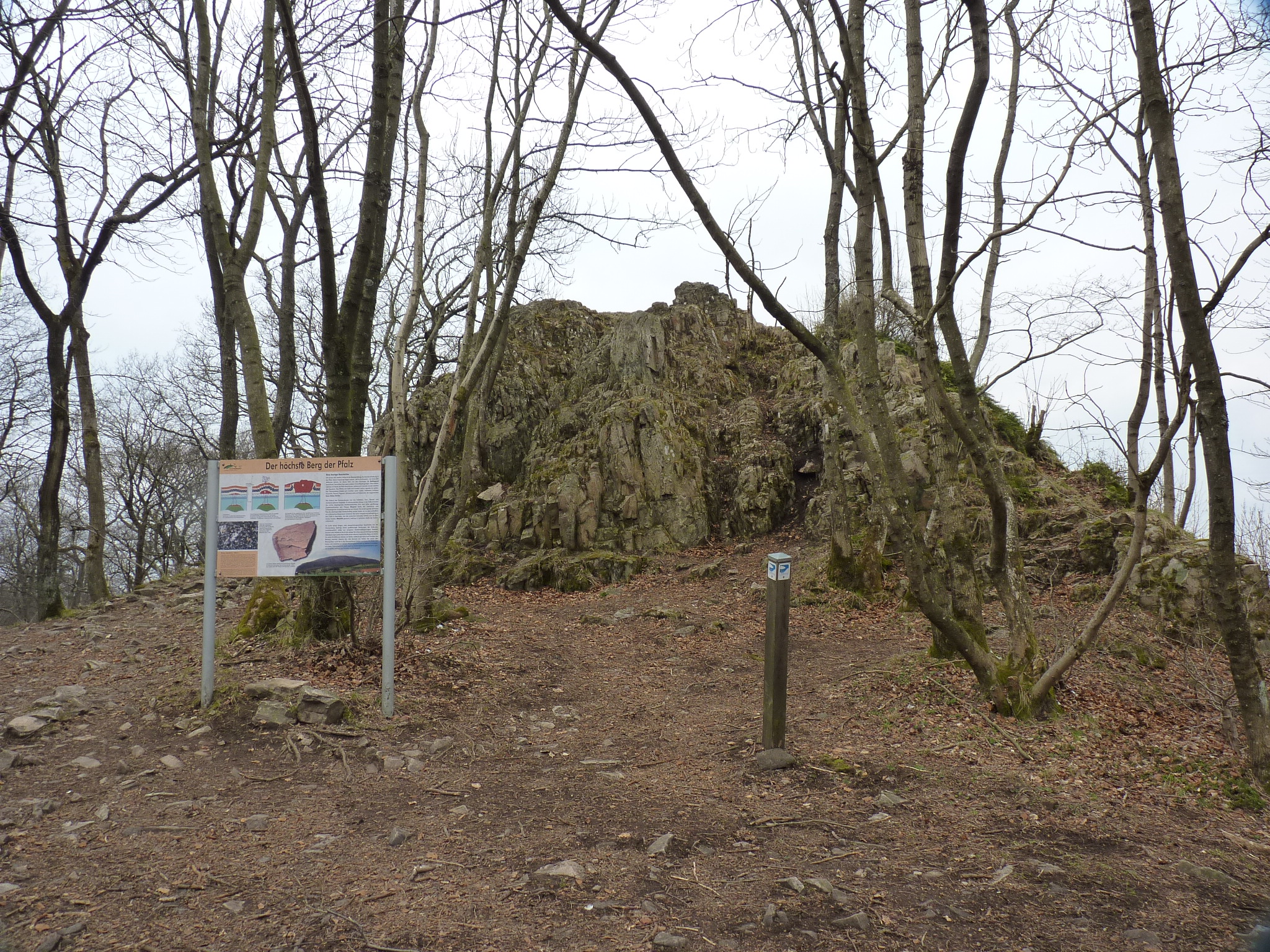 Der Königsstuhl am Donnersberg im April 2015, im Vordergrund ist ein Hinweisschild zu sehen.